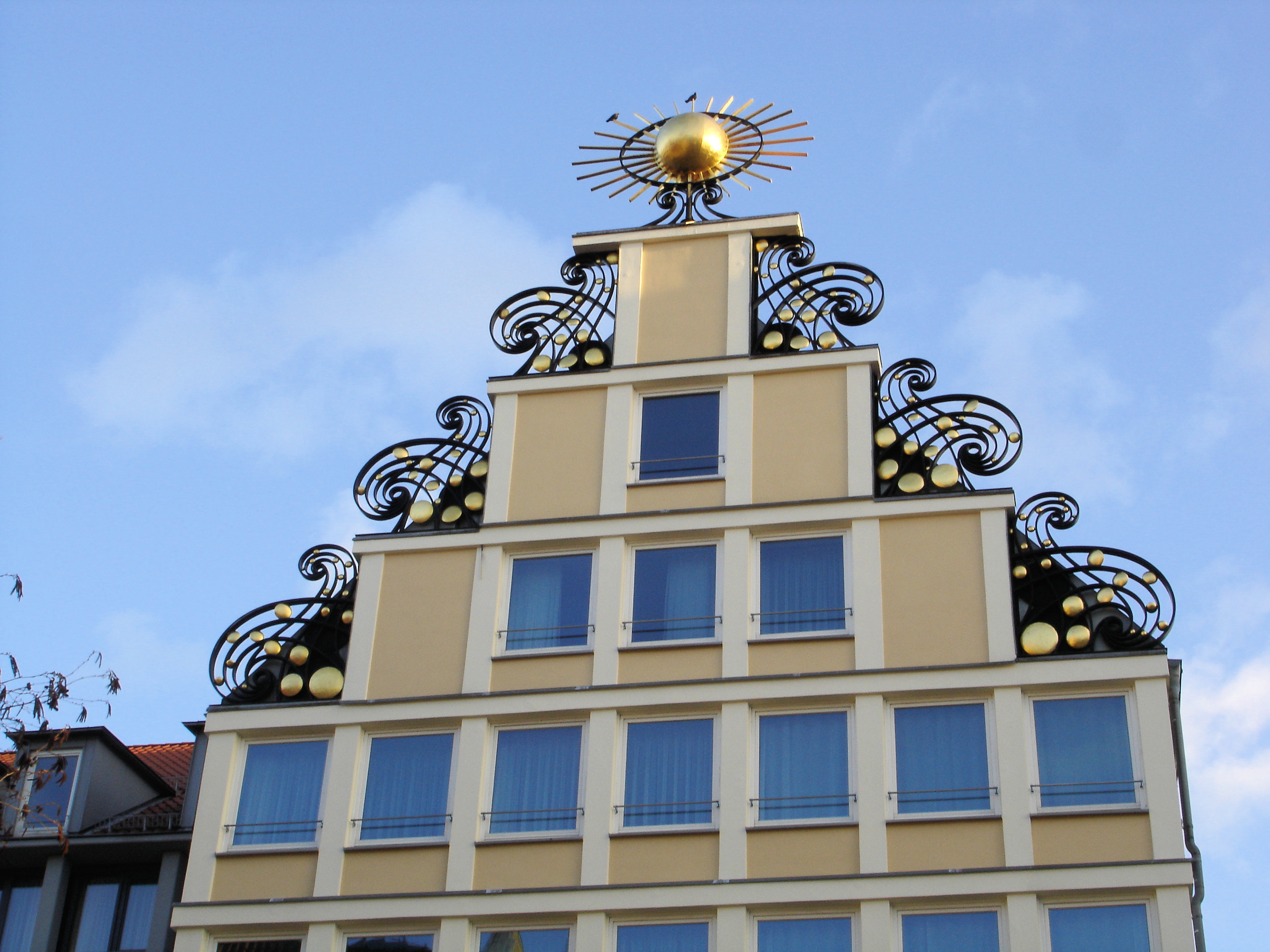 Giebel Hotel "Haus Sonne" in Rostock, Metallschmuck von Manfred Kandt und Günter Laufer 1967/68